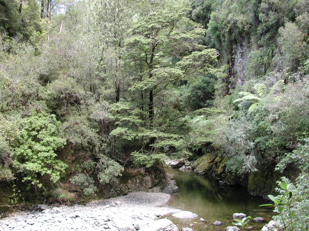 Akatarawa River West in Karapoti Gorge.